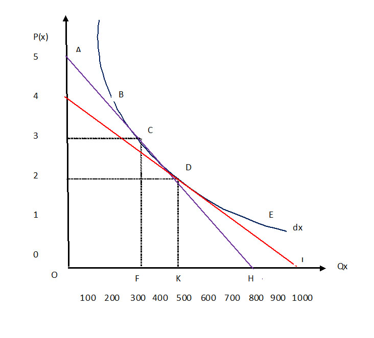 رسم بياني